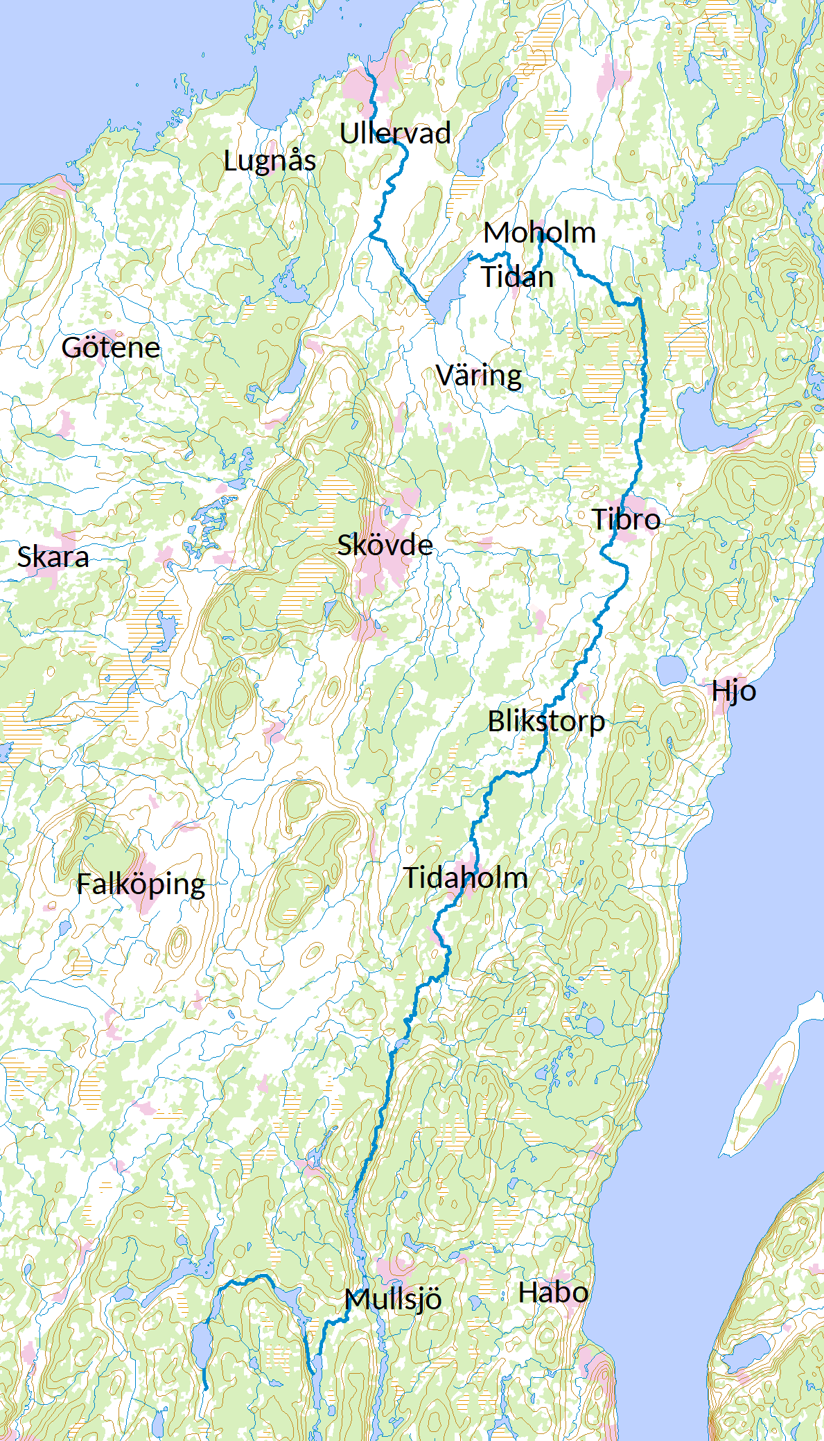 Karta över ån Tidan.